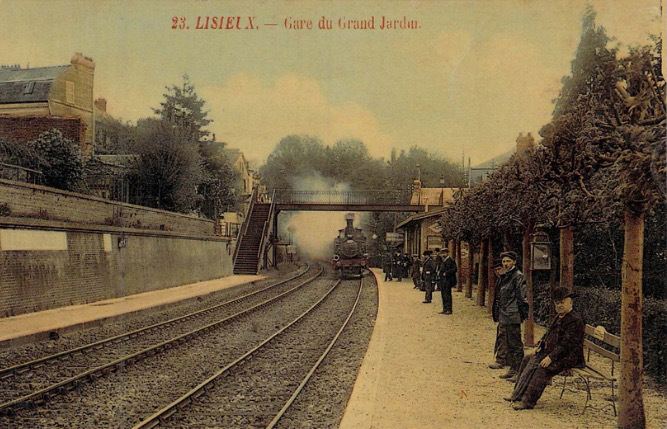 La gare du Grand-Jardin à Lisieux